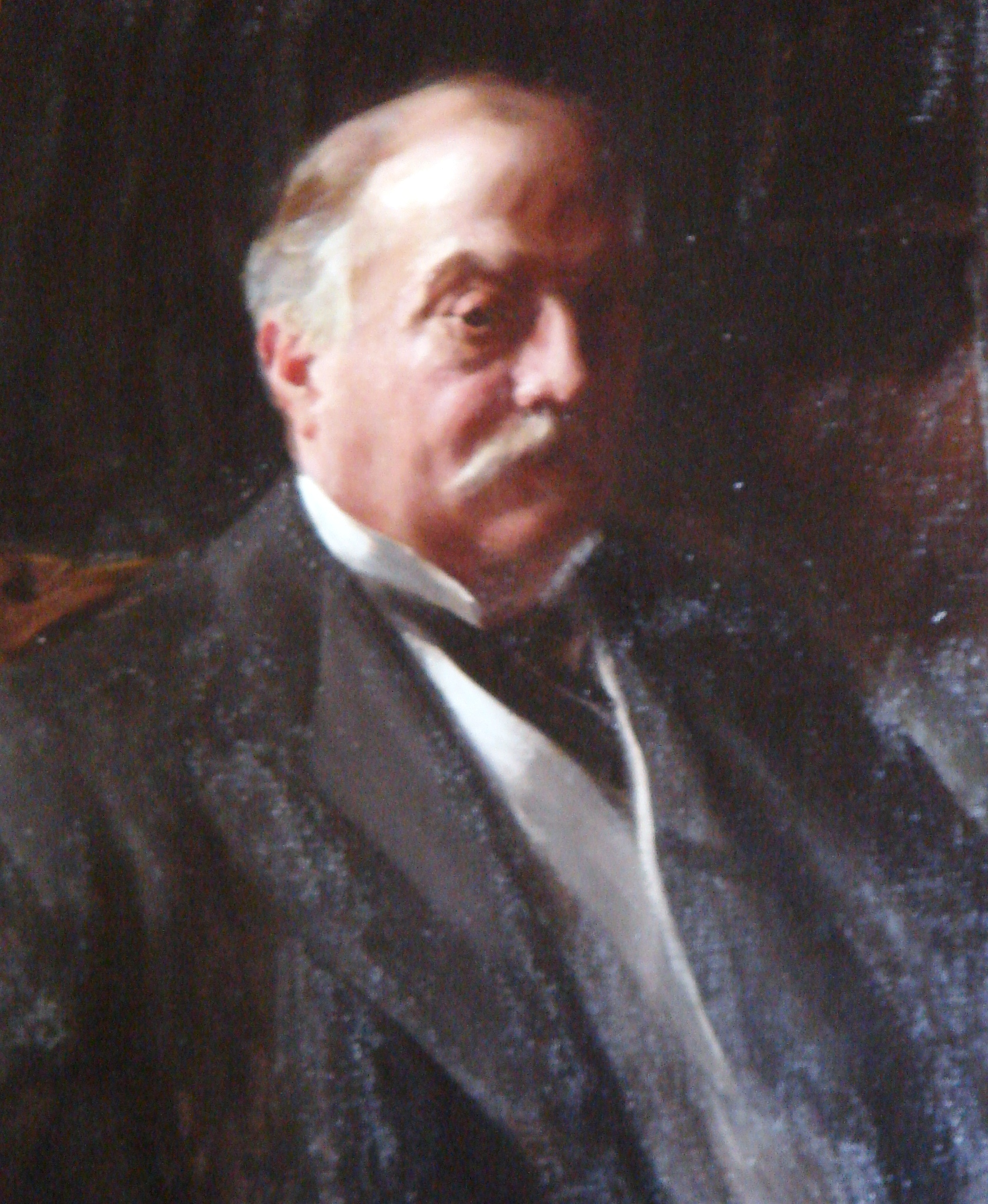 Professor Harald Hjärne 1848-1922. Uppsala universitet.